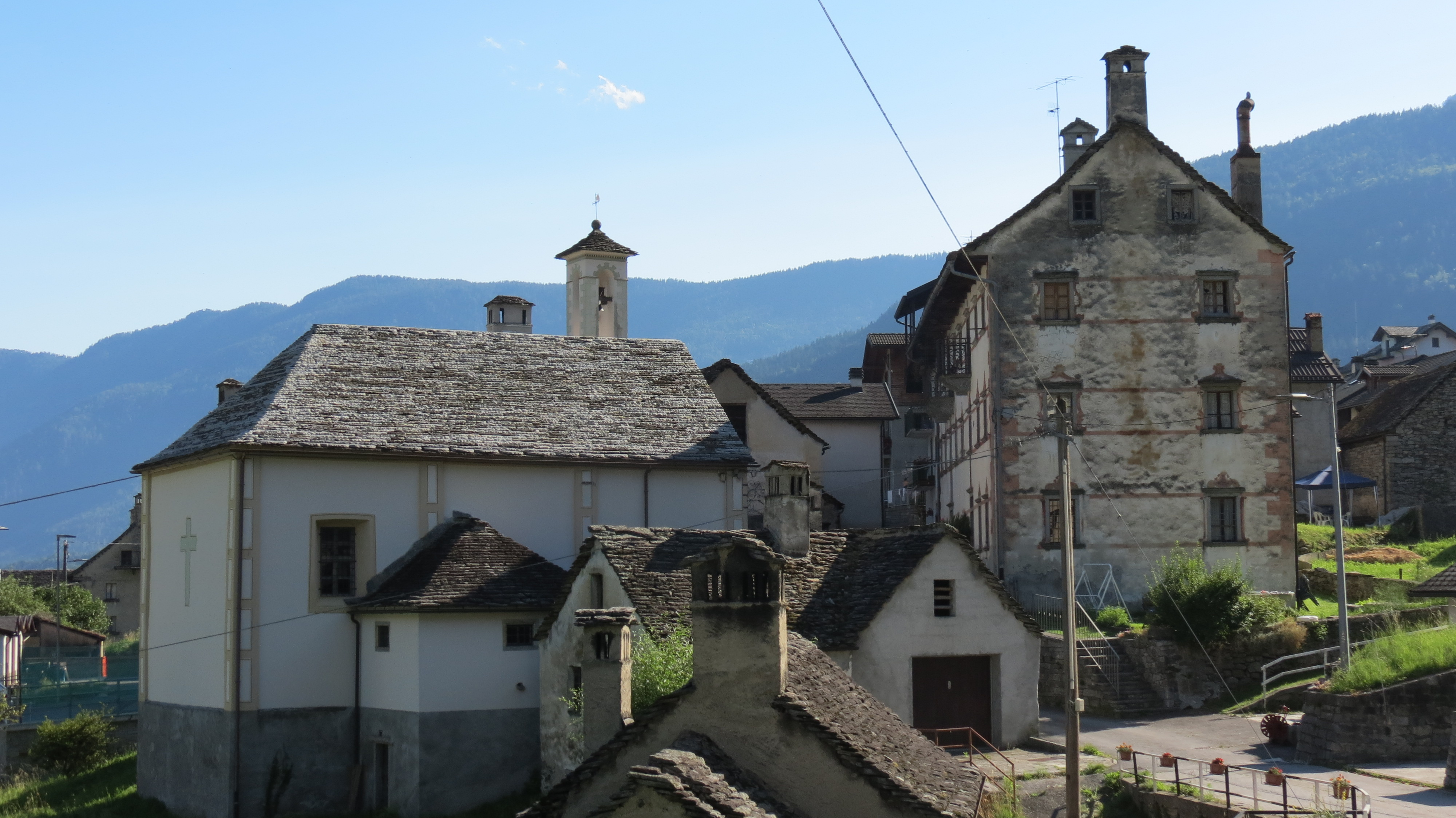 Ortspartie im Weiler Pioda, Premia, Val d' Ossola